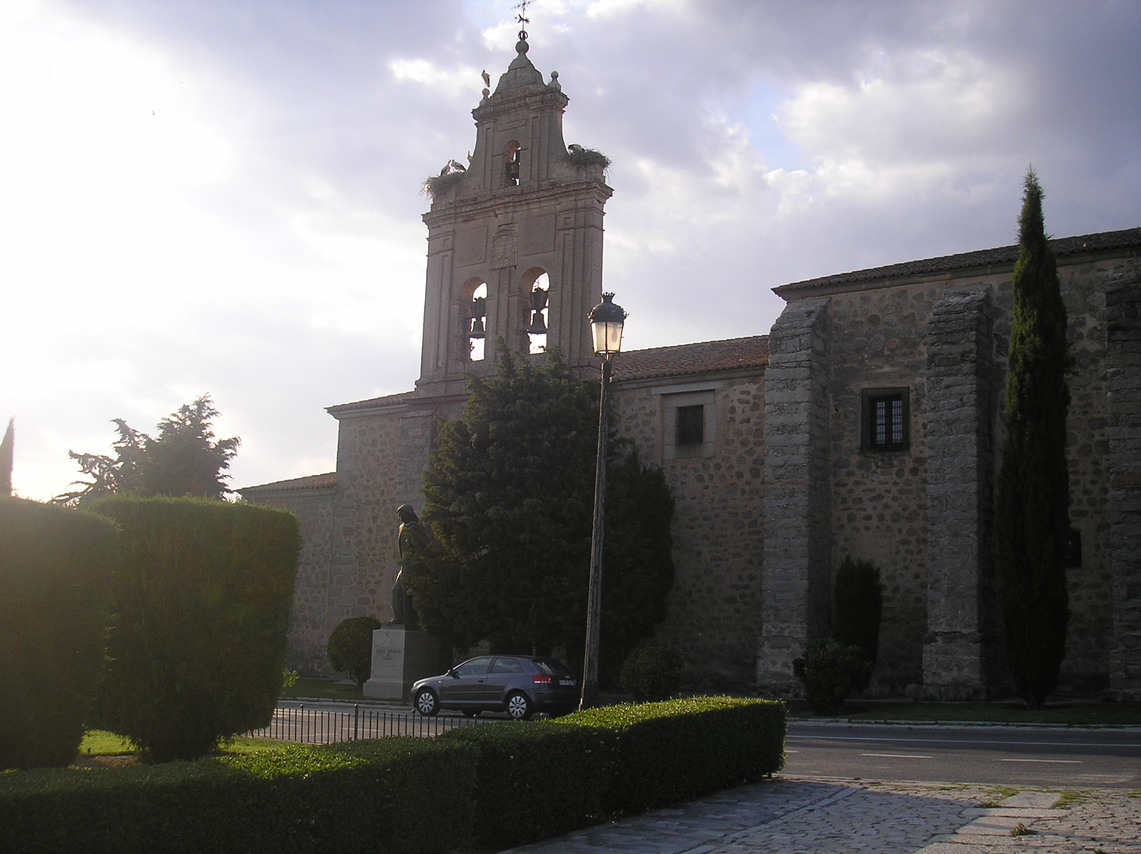 Ávila. Convento de la Encarnación. Ávila. Convent of la Encarnación. -- Foto tomada por Jorge González. Foto taken by Jorge González.